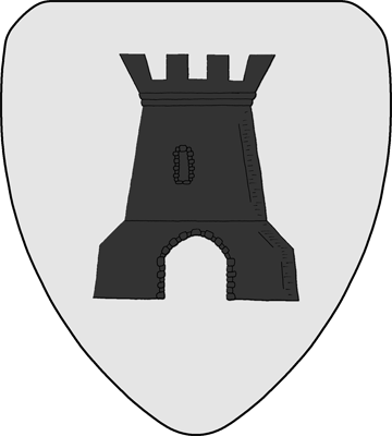 Armoiries de la commune belge de Braine-le-Comte, blasonné d'argent à une tour, crenelée de deux pièces et de deux demies, de sable